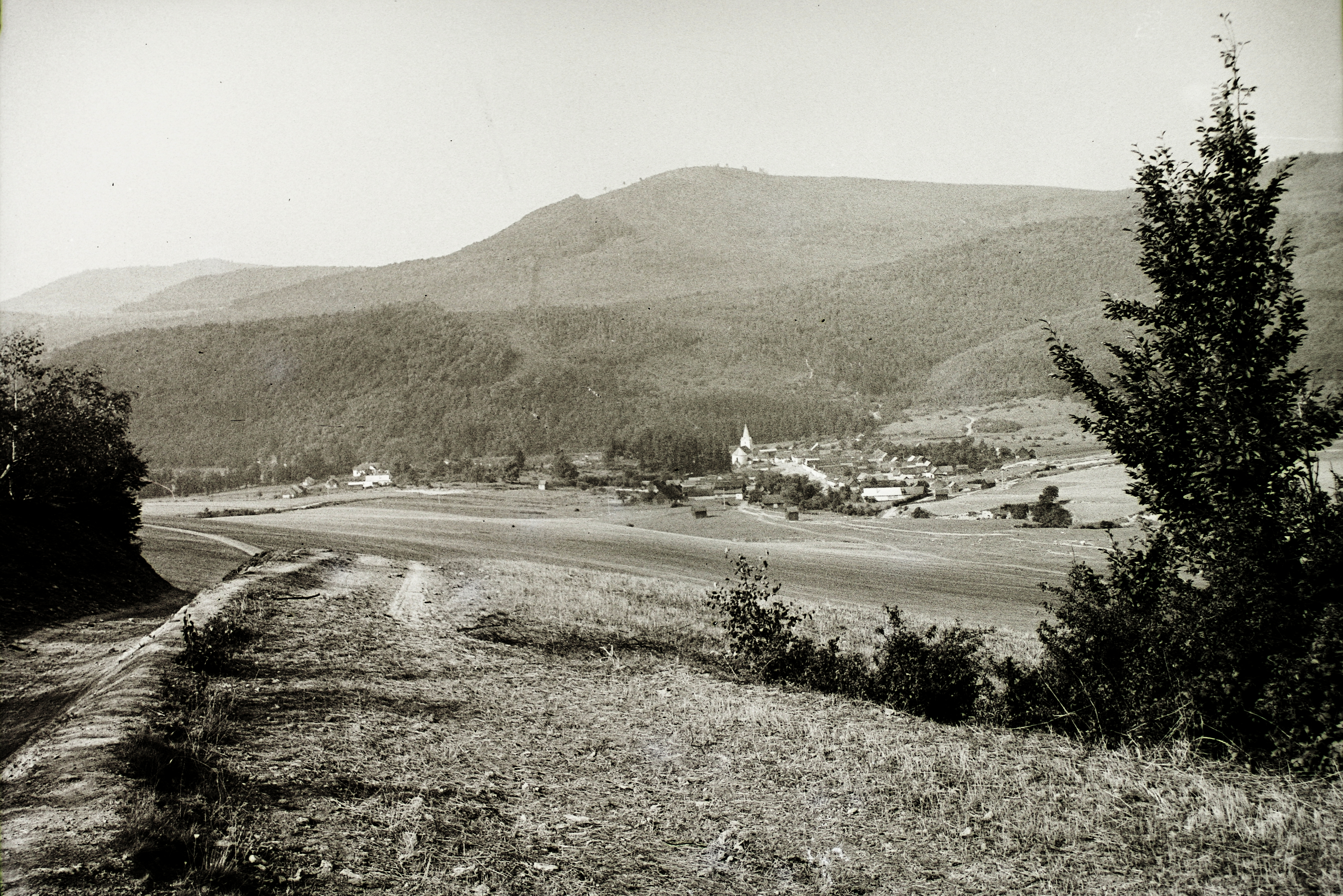 a község látképe az evangélikus templommal. Location: Slovakia, Vlachovo Tags: Czechoslovakia, picture Title: a község látképe az evangélikus templommal.